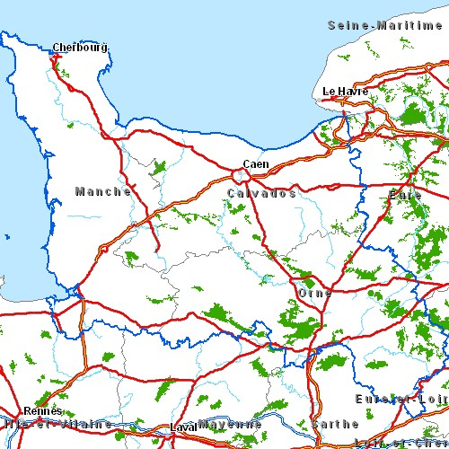 Carte routière de la région Basse-Normandie Légende